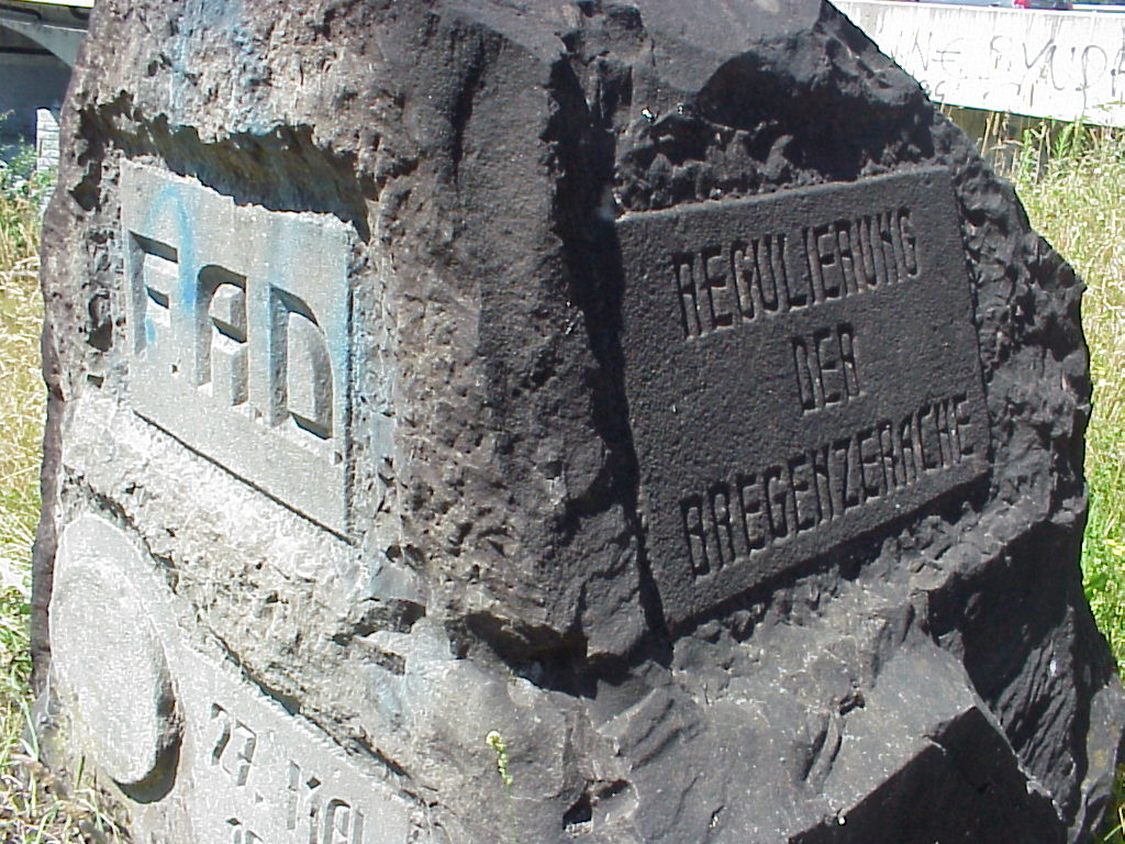 Gedenkstein zur Fertigstellung der Regulierung der Bregenzer-Ache durch den FAD und SAD.